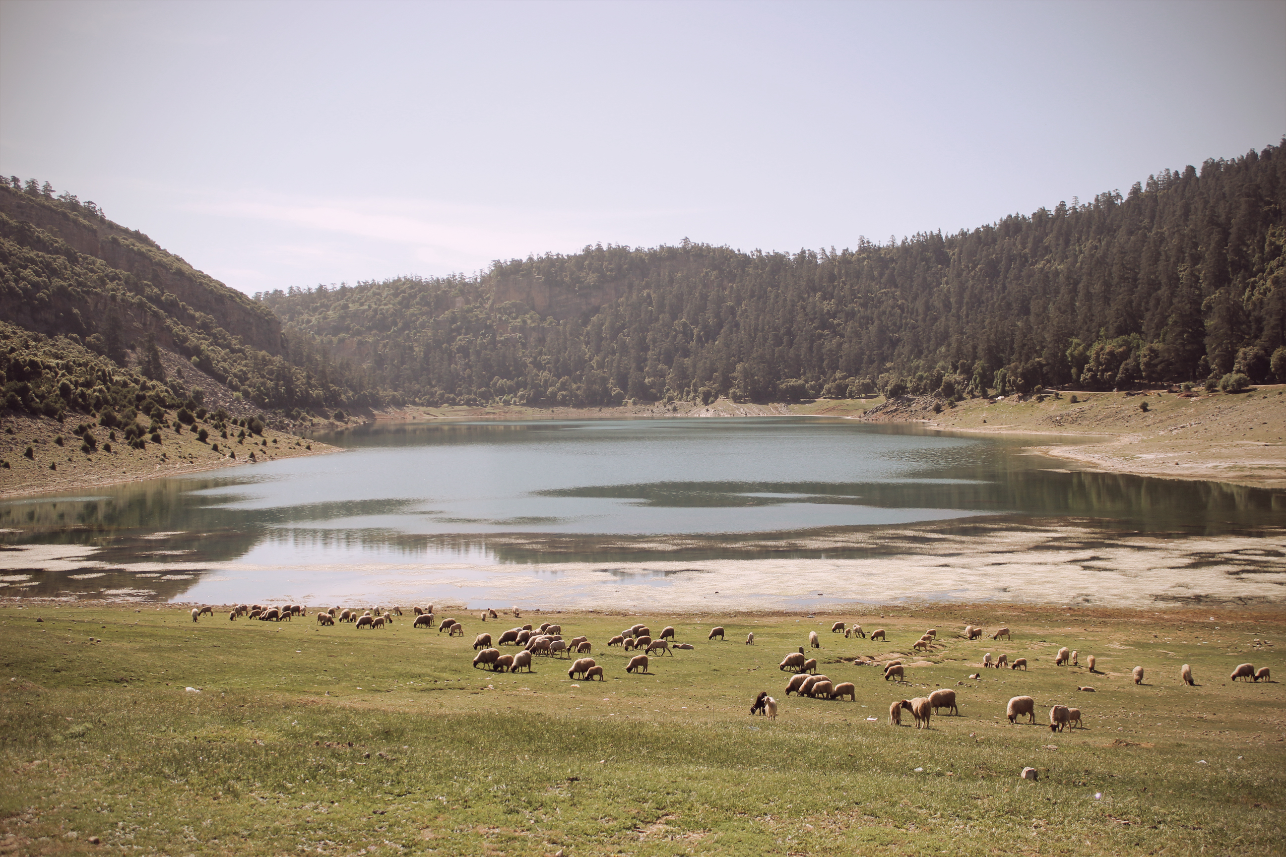 Plateau d'Ajdir, futaie de cèdre, province de Khénifra